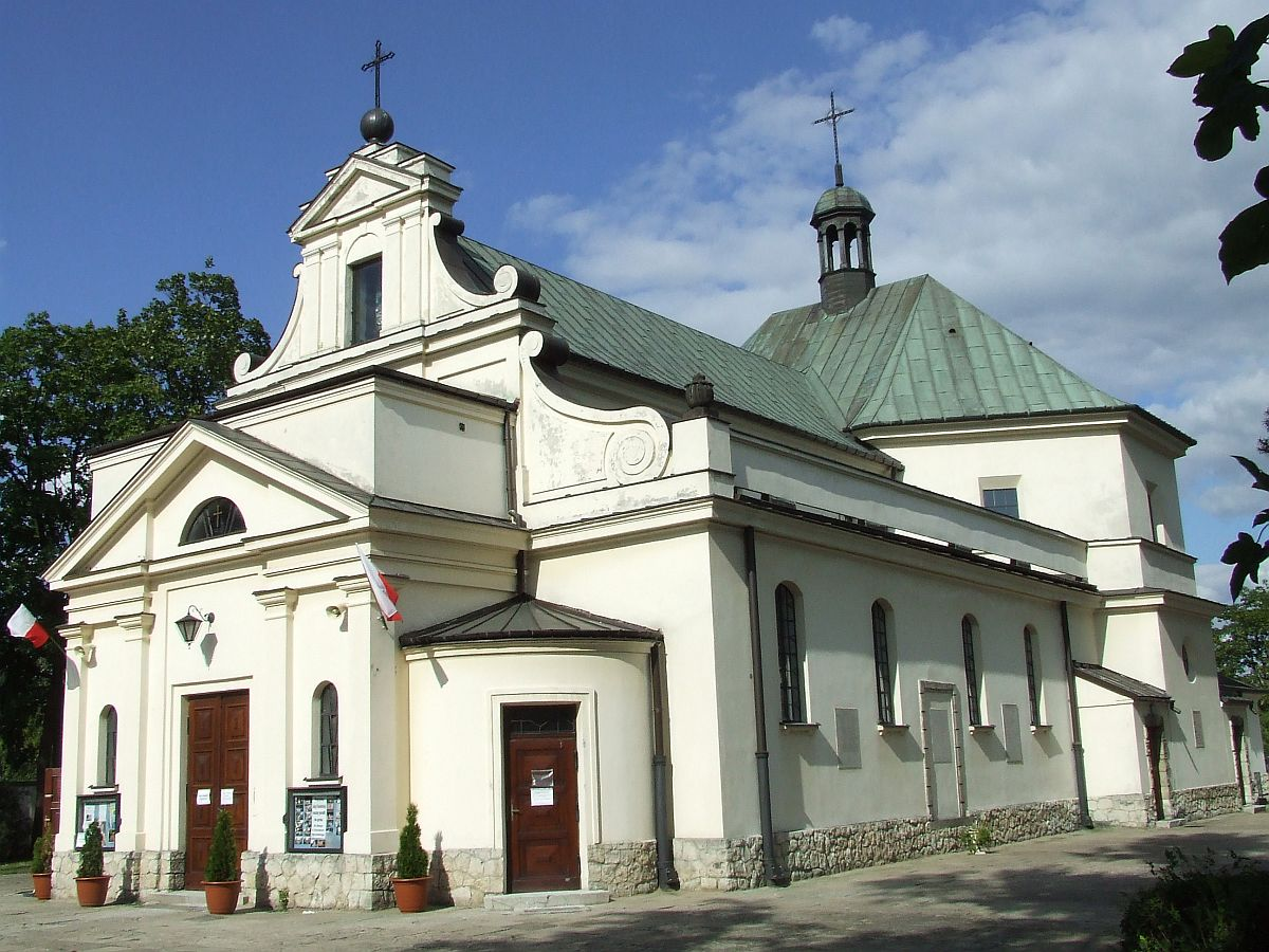 Kościół na Marymoncie, Warszawa (zabytek nr rejestr. 165)